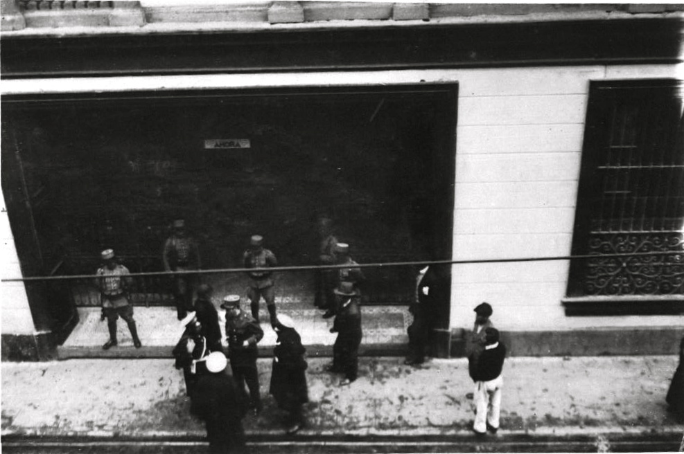 Periodico